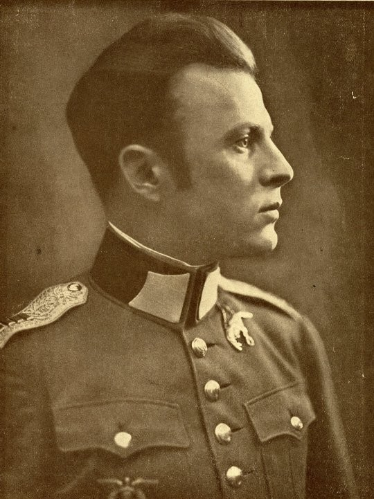 František Malkovský (1897 - 1930), Vojenský akrobatický pilot.